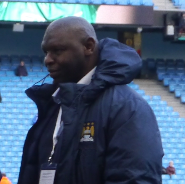 Photo de Shaun Goater.